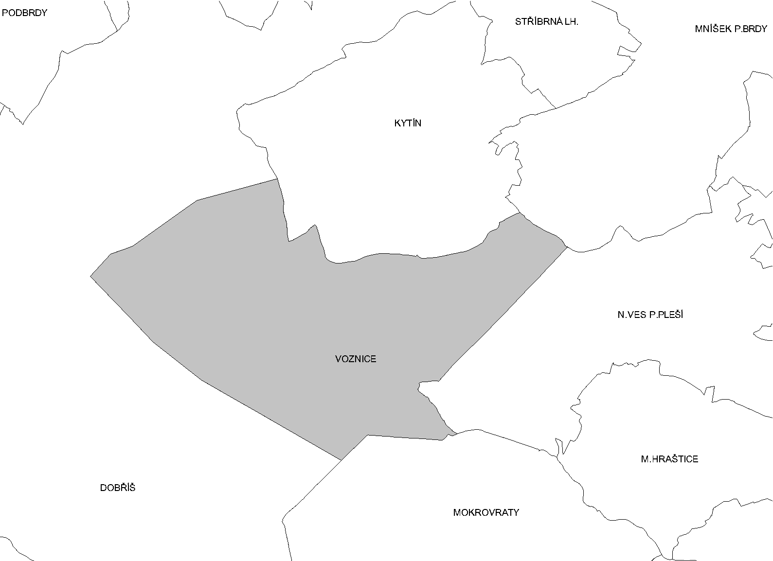 Katastr Voznic